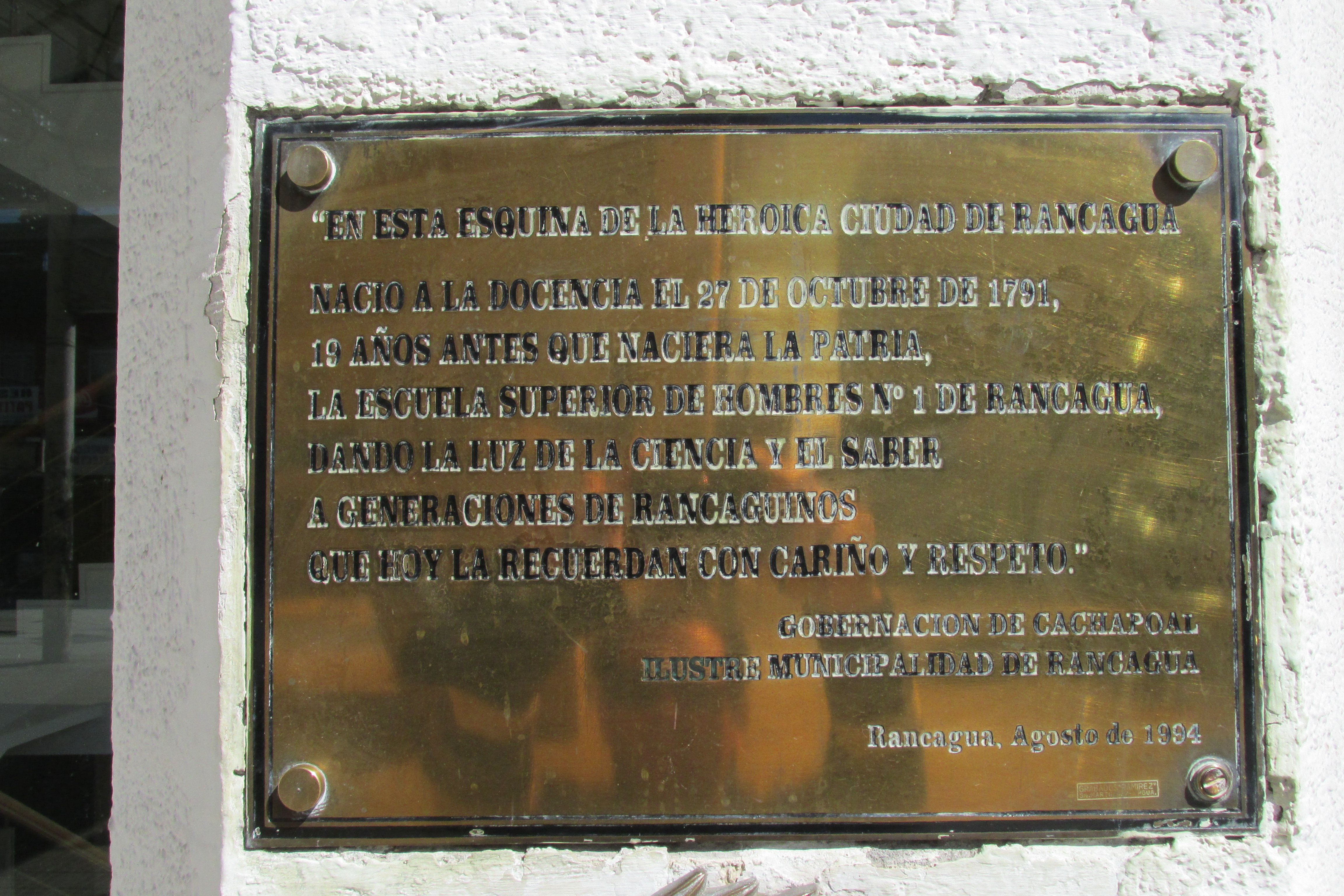 Placa Recordatoria (Calle Bueras con Independencia) Lugar de Fundación Escuela Nª 1 (actualmente Colegio Moises Mussa) en Rancagua